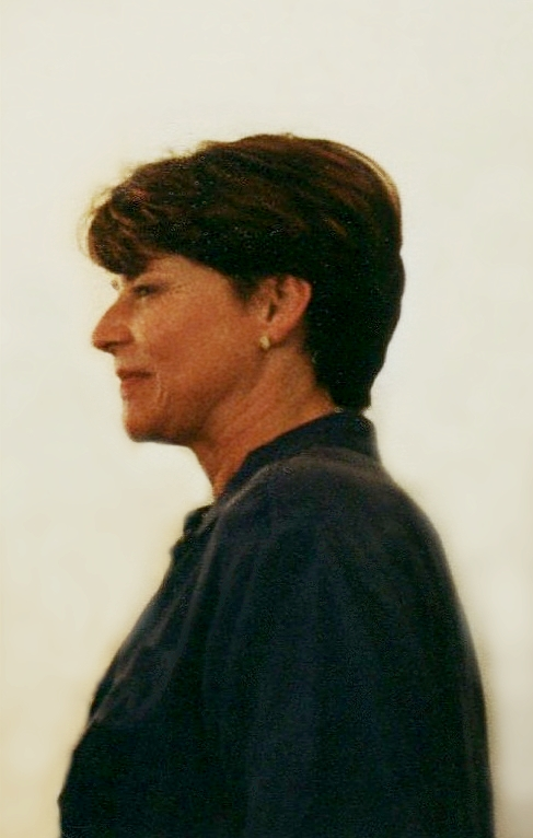 Porträt Ulrike Wolf, CDU, erste Funkhausdirektorin MDR